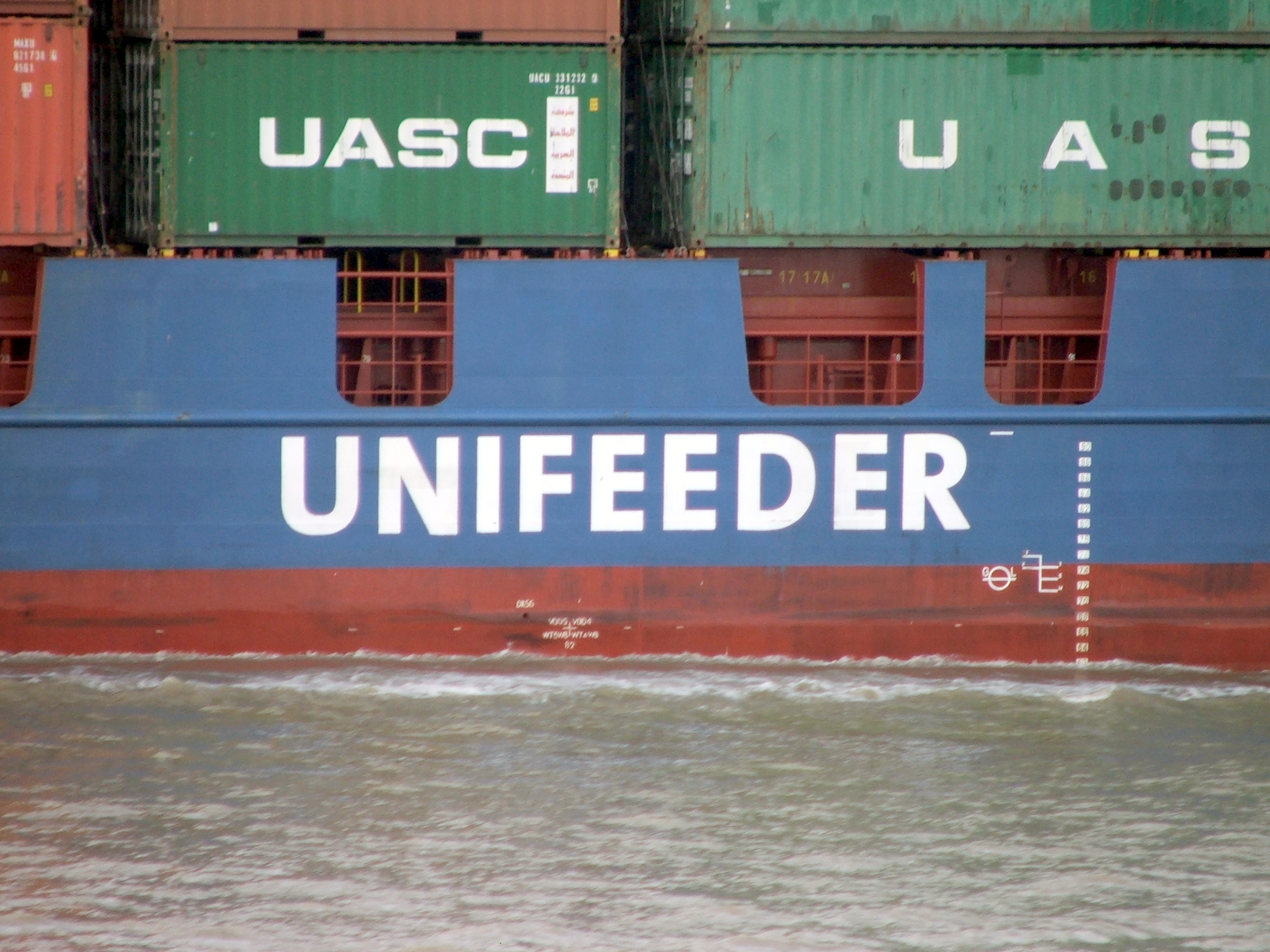 Außenbords-Schriftzug an einem Schiff der Unifeeder